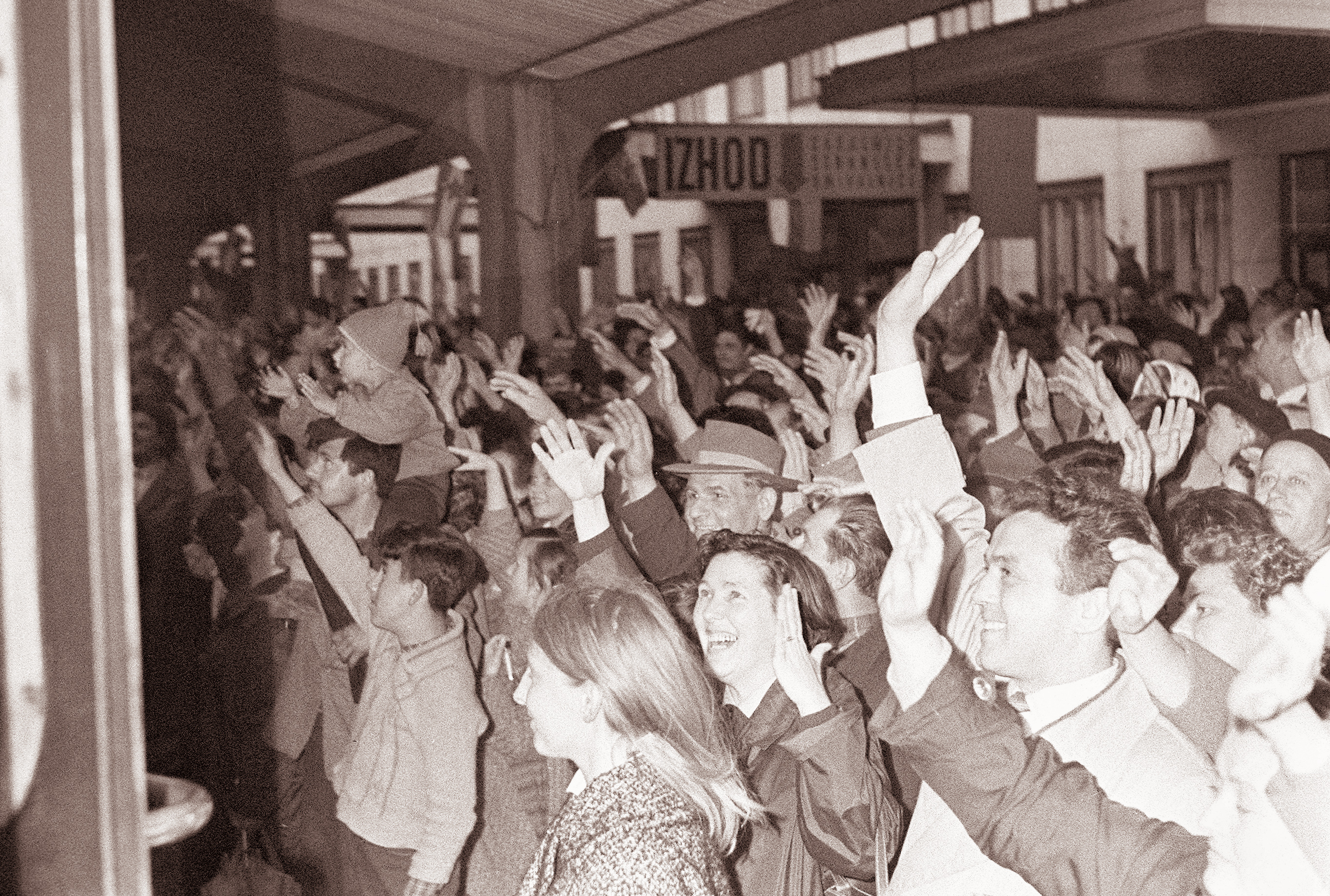 Vlak Bratstva in enotnosti v Mariboru ob slovesu